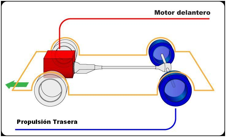 Esquema típico de Motor delantero y transmisión trasera